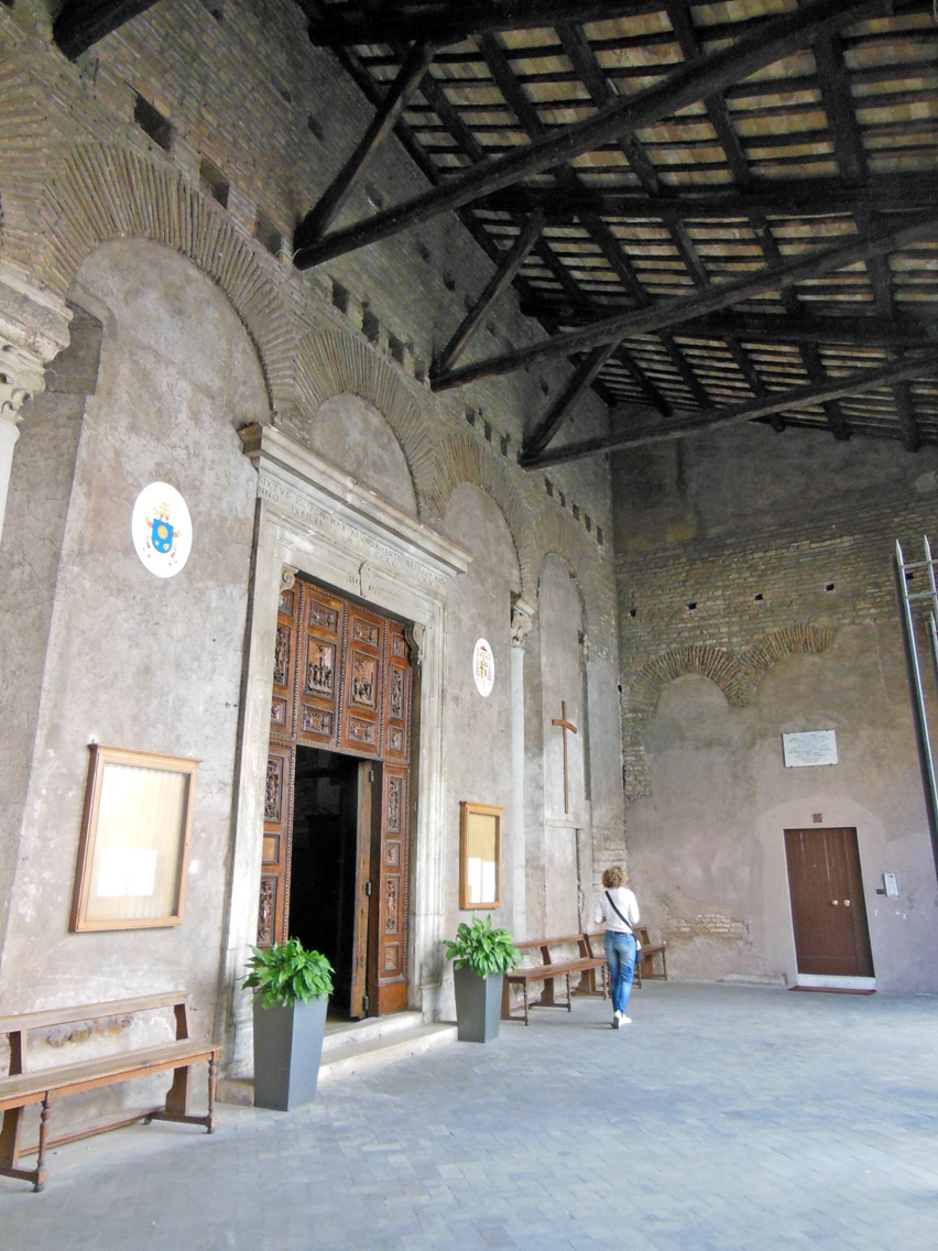 Roma, chiesa di San Vitale (via Nazionale), portico in facciata, interno